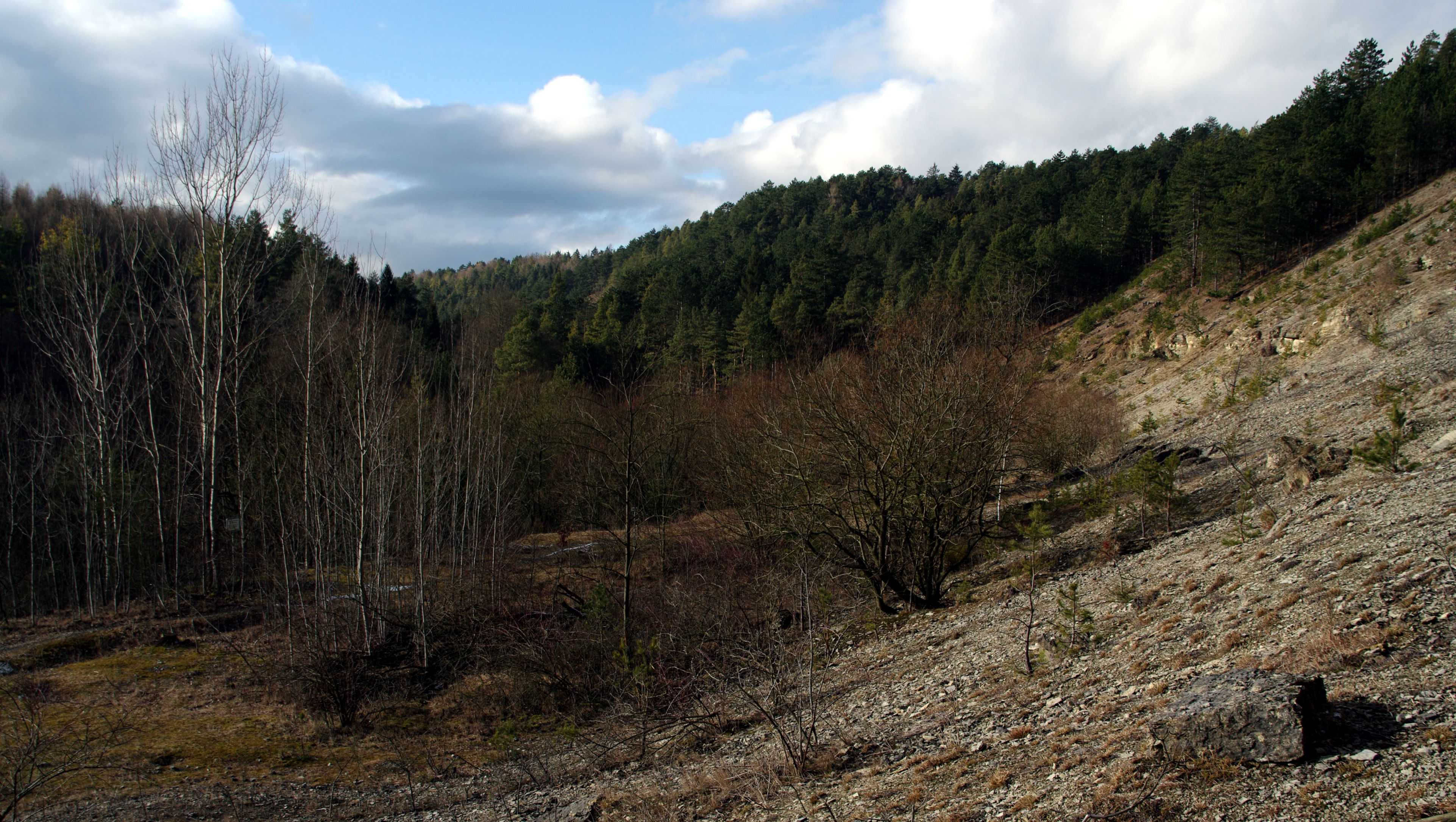 Landschaft im Jonastal